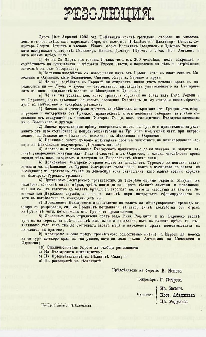 Резолюция на митинг на гражданите на Пазарджик по повод клането в Загоричани.